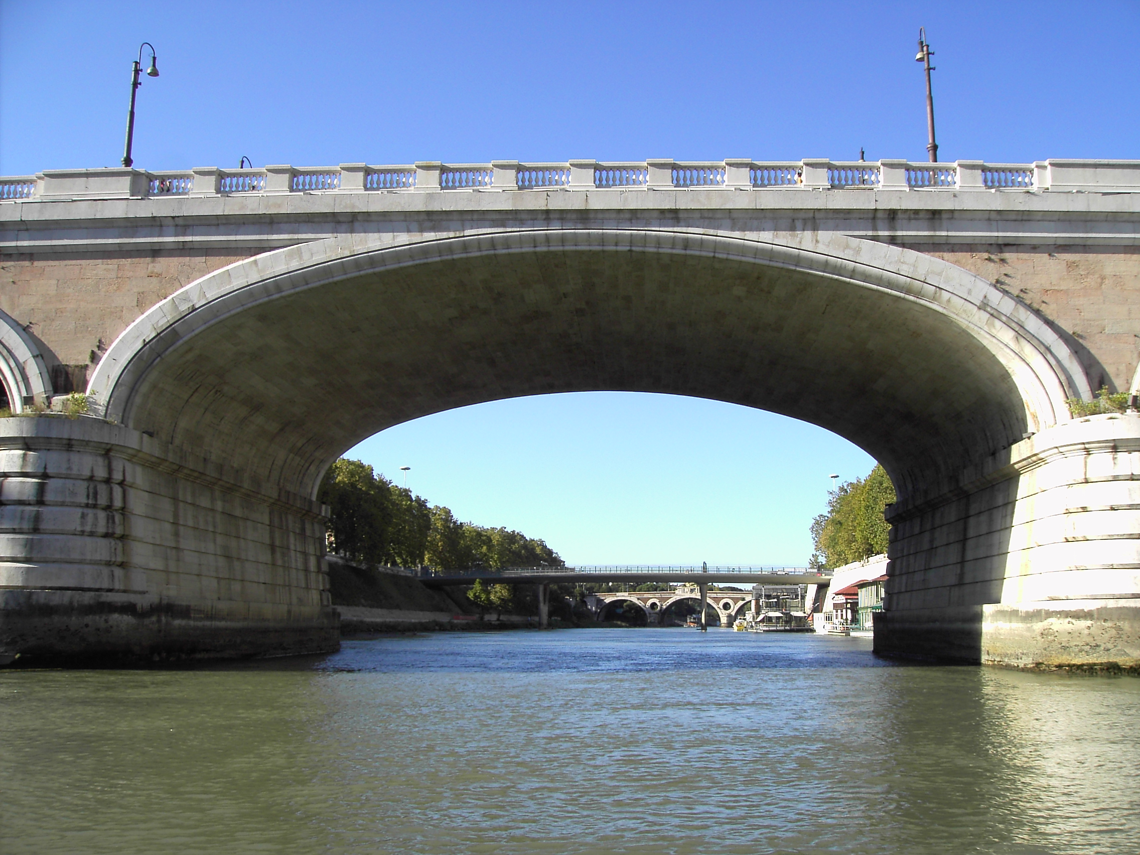 Roma: la sequenza di Ponte Regina Margherita (in primo piano), Ponte Pietro Nenni, Ponte Giacomo Matteotti